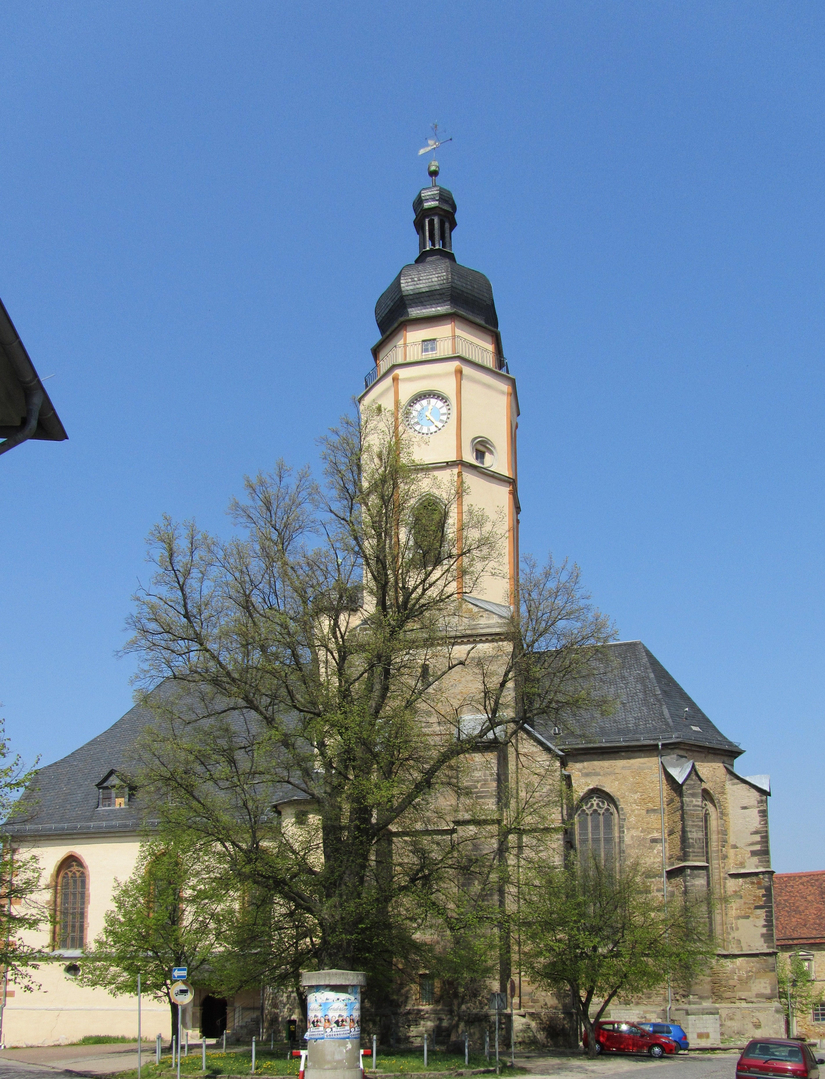 Die Stadtkirche von Buttstädt (Thüringen).